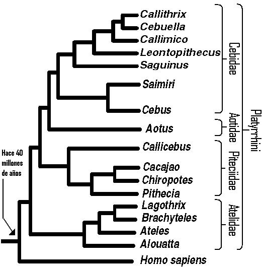 Cladograma de los monos del Nuevo Mundo